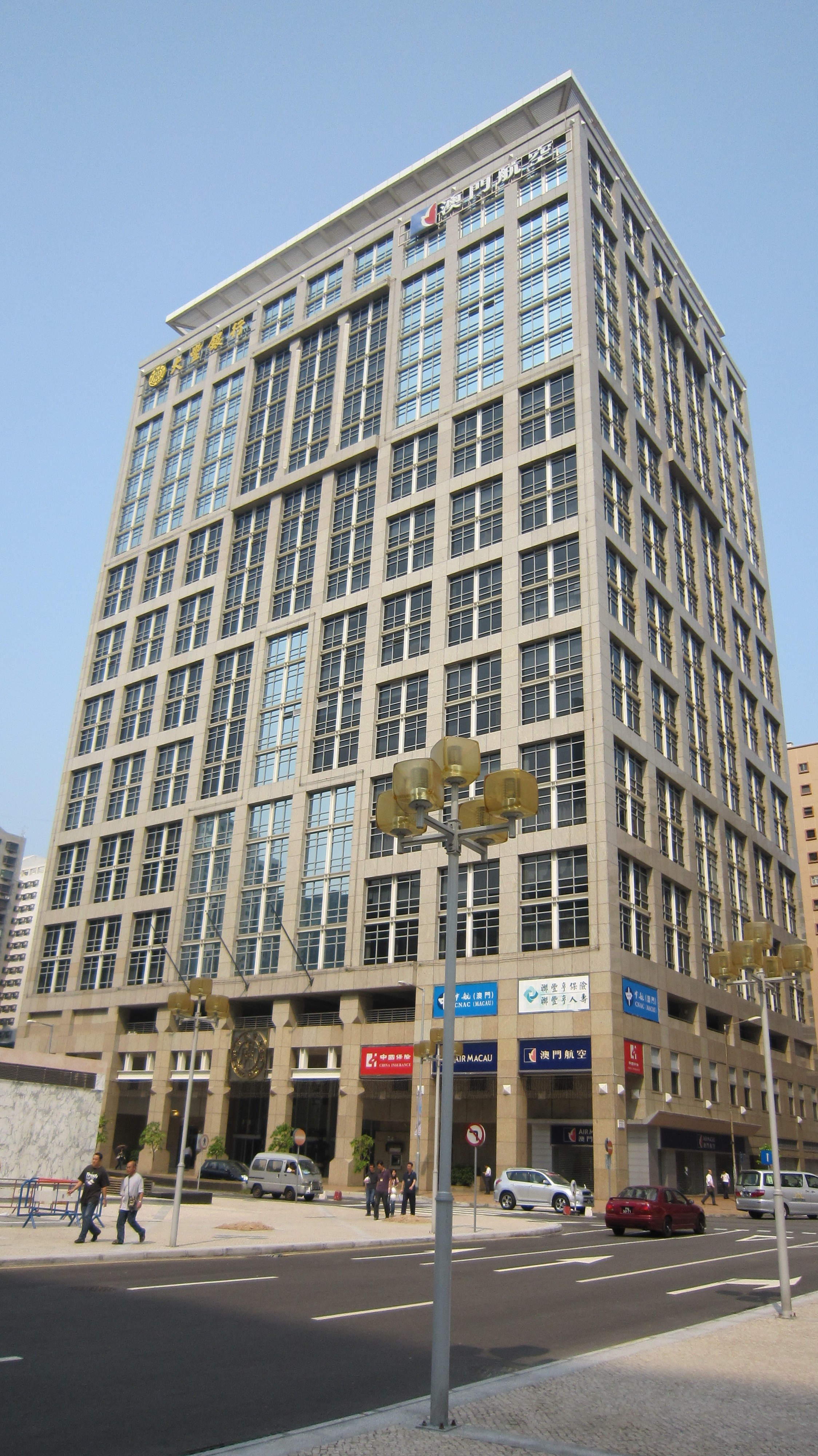 Edifício do Banco Tai Fung e Edifício CNAC